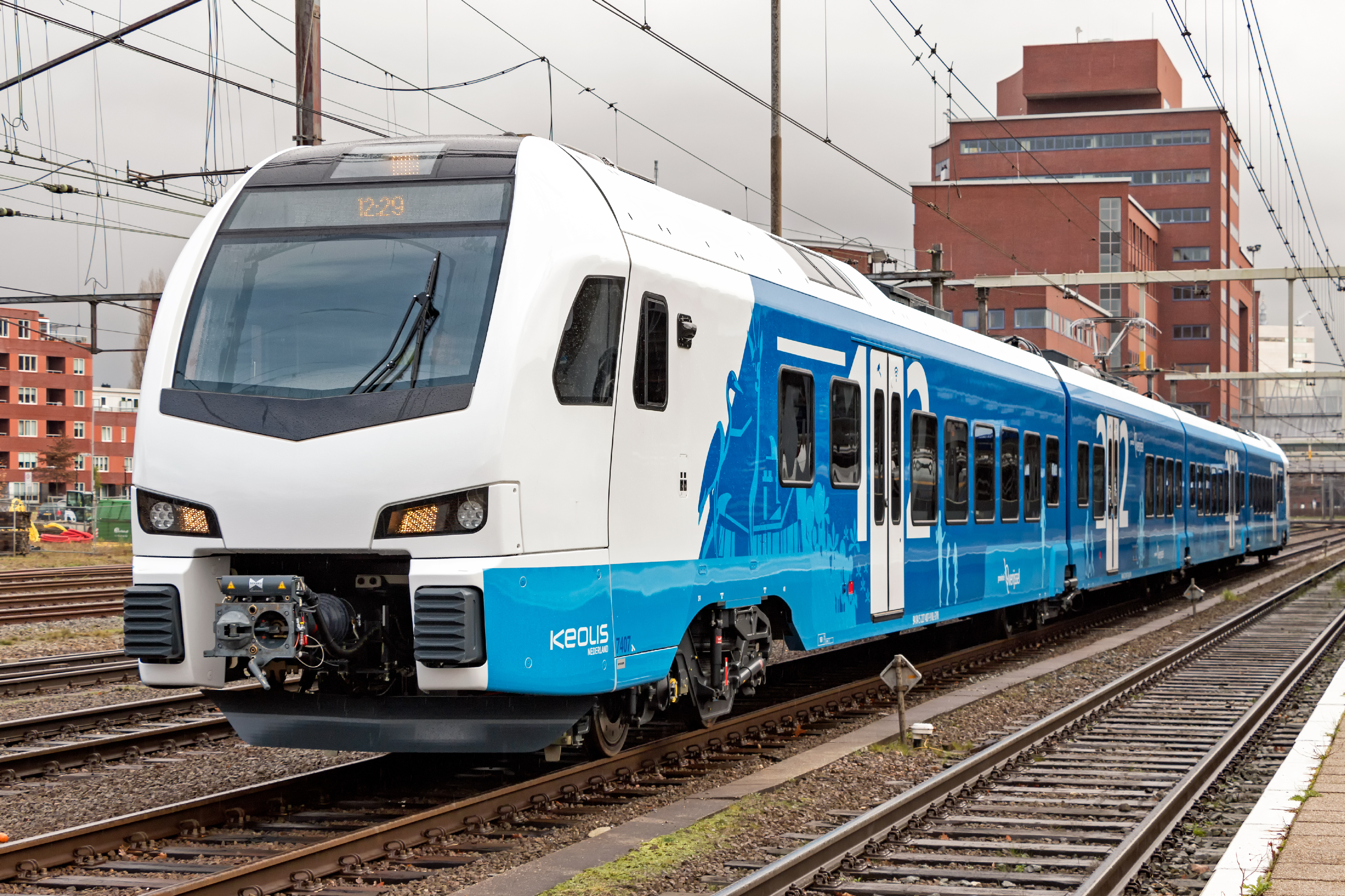 FLIRT-treinstel van Keolis Nederland (vroeger Syntus) in de Blauwnet-kleurstelling.